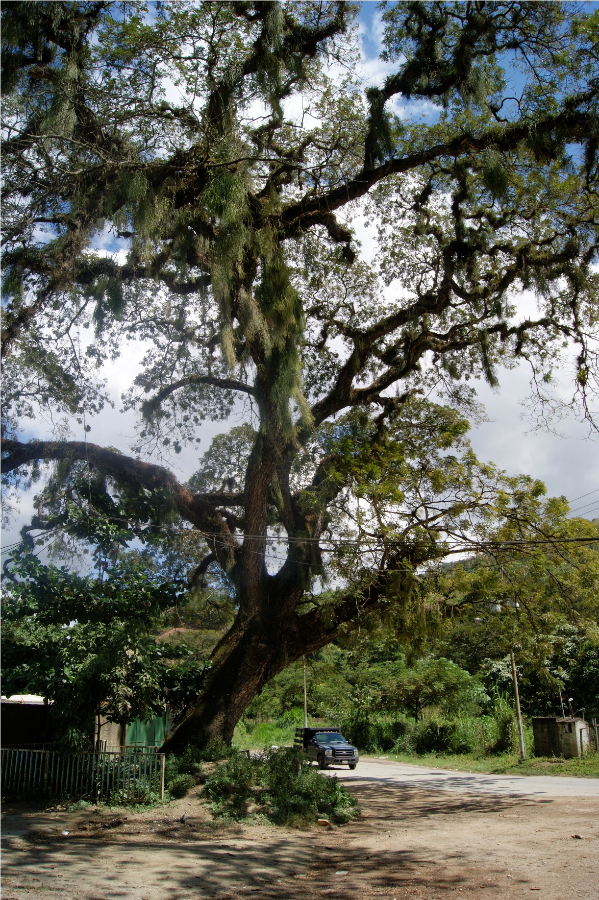 Samán ubicado en el sector de Ceniza, en el poblado de Araira, estado Miranda, Venezuela.